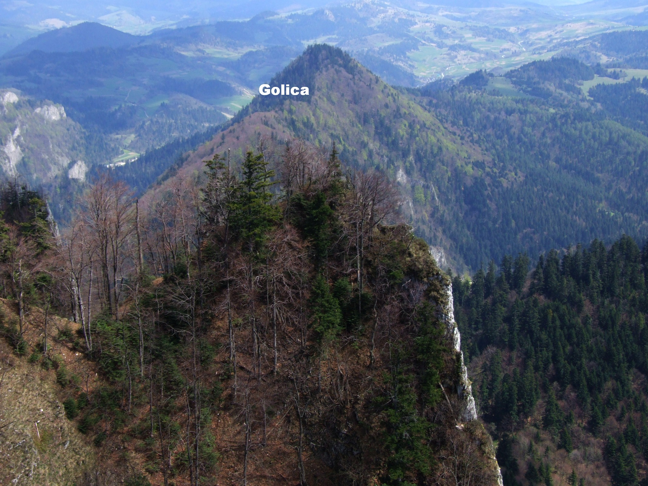 Golica i Małe Pieniny. Widok z Trzech Koron